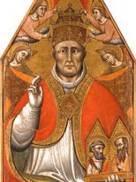 Urbanus V, Popelabel QS:Len,"Urbanus V, Pope" label QS:Lfr,"Pape Urbain V" label QS:Lde,"Papst Urban V."